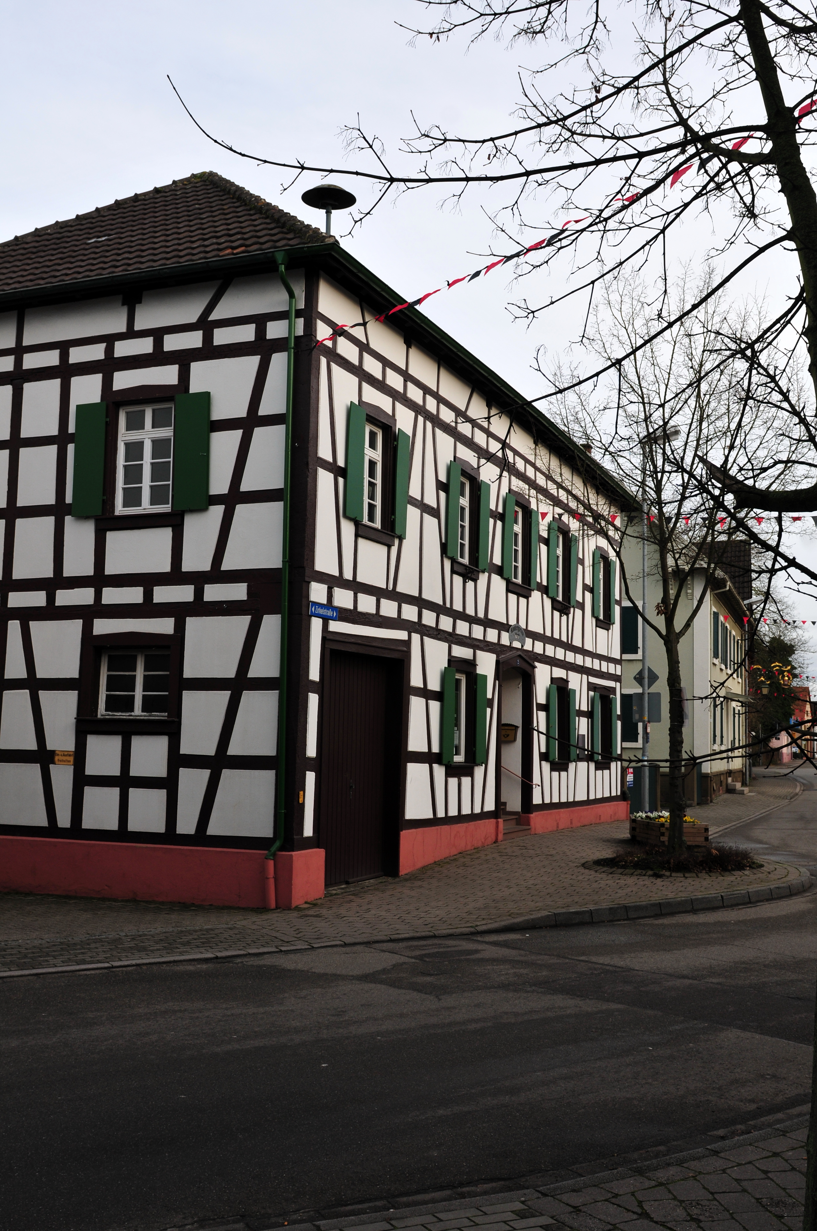 Kork European Parliament 2014 3.–7. February 2014, StrasbourgThis photo has been created within the project "WIKI loves parliaments / European Parliament". Usage and Help If you have any questions concerning this picture or how to use it, feel free to